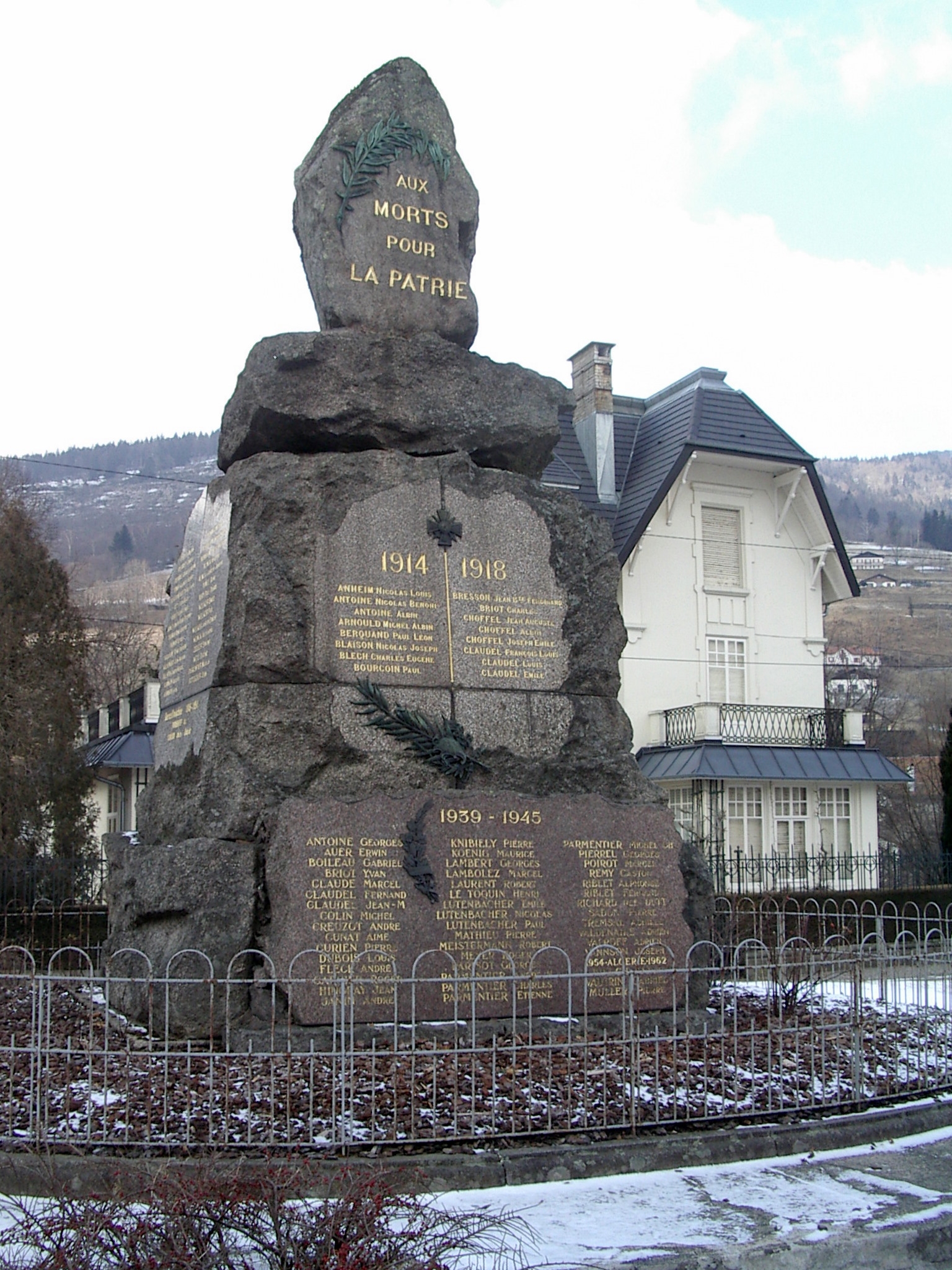 Monument aux morts de Bussang (Vosges, 88)